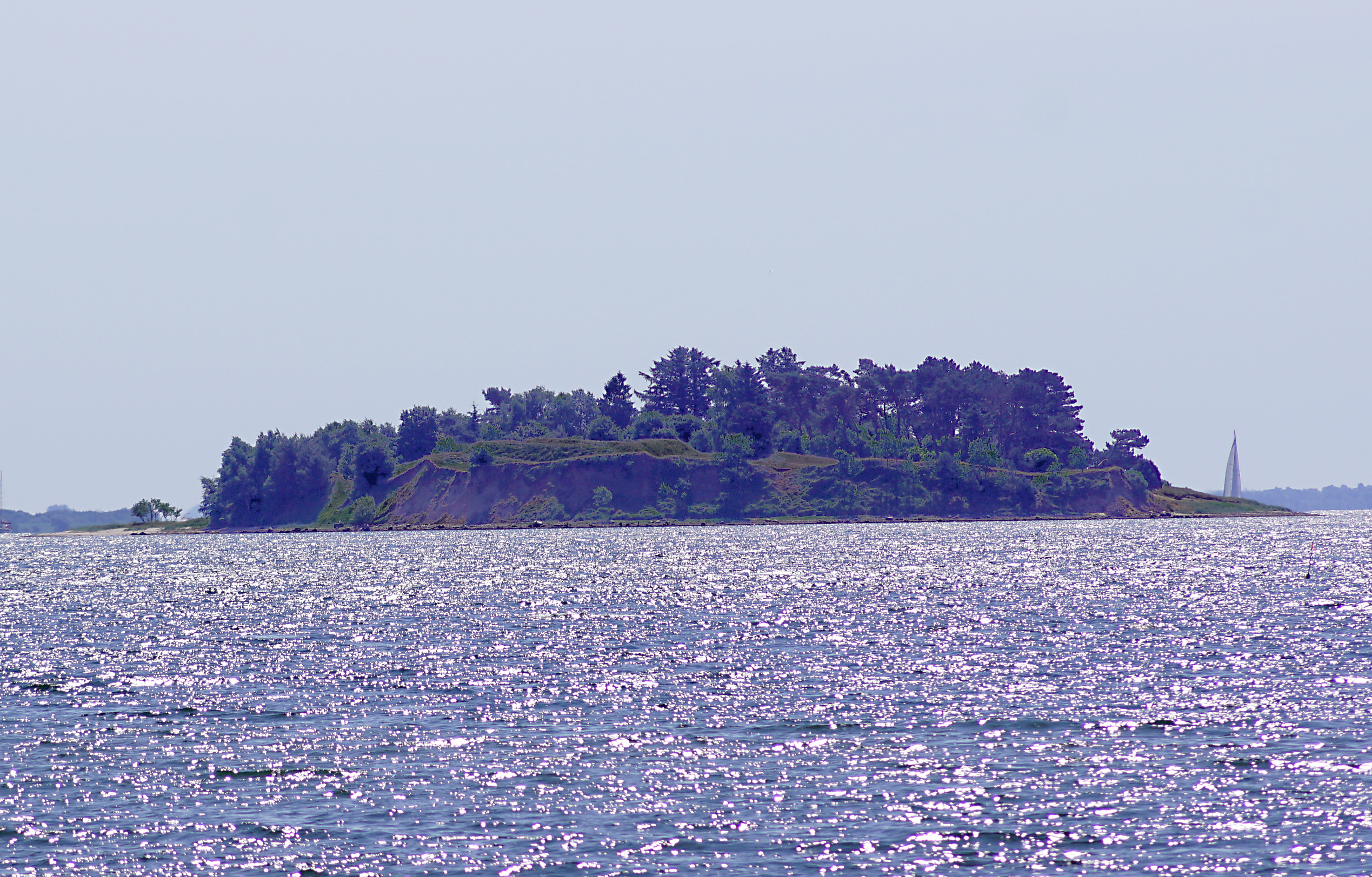 Fænø Kalv set fra Skærbæk Havn